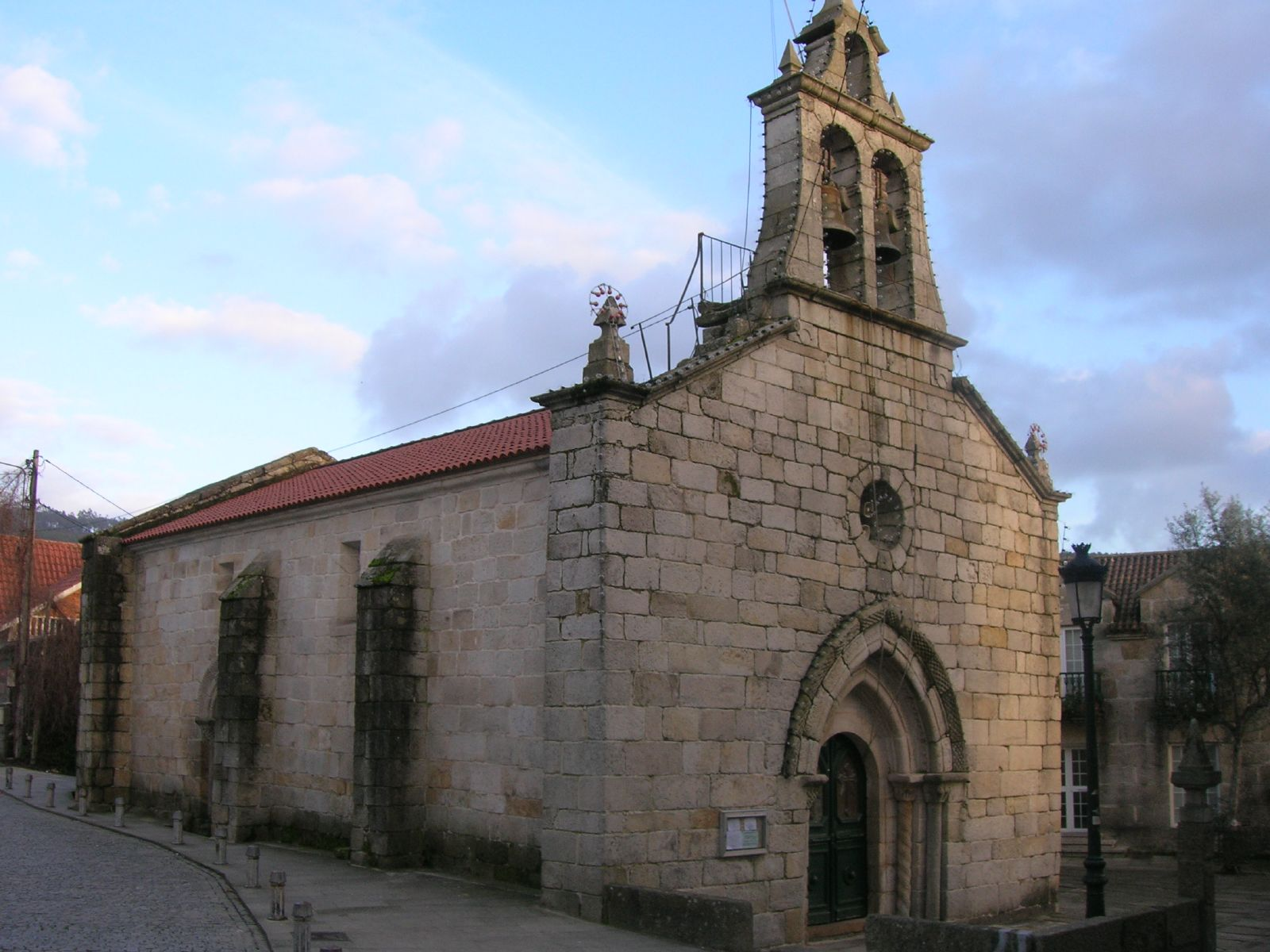 La nave está dividida en tramos por dos arcos transversales apoyados sobre semicolumnas adosadas.